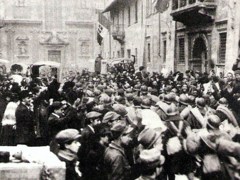 Truppe italiane entrano a Trento il 3 novembre 1918, al termine della Prima guerra mondiale